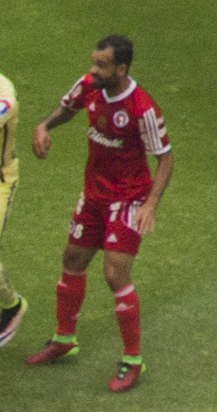 América vs Tijuana